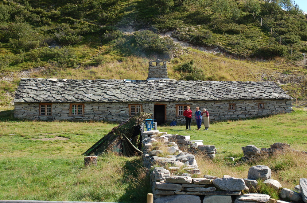 Rausjødalen Setermeieri, Tolga, Norway, Summer 2006